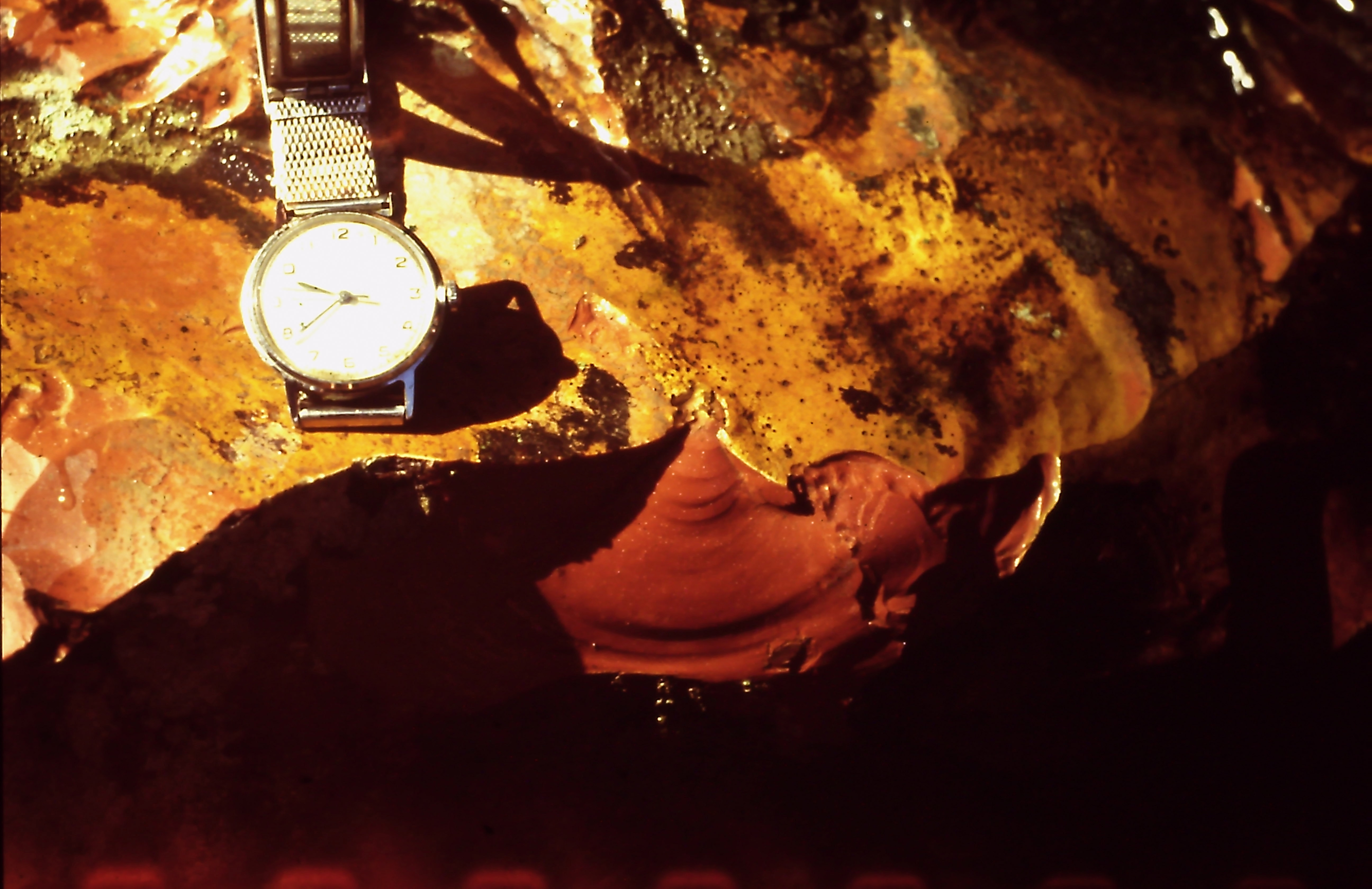 Fractura concoidea del jaspe. Quebrada del Jaspe, La Gran Sabana, Venezuela